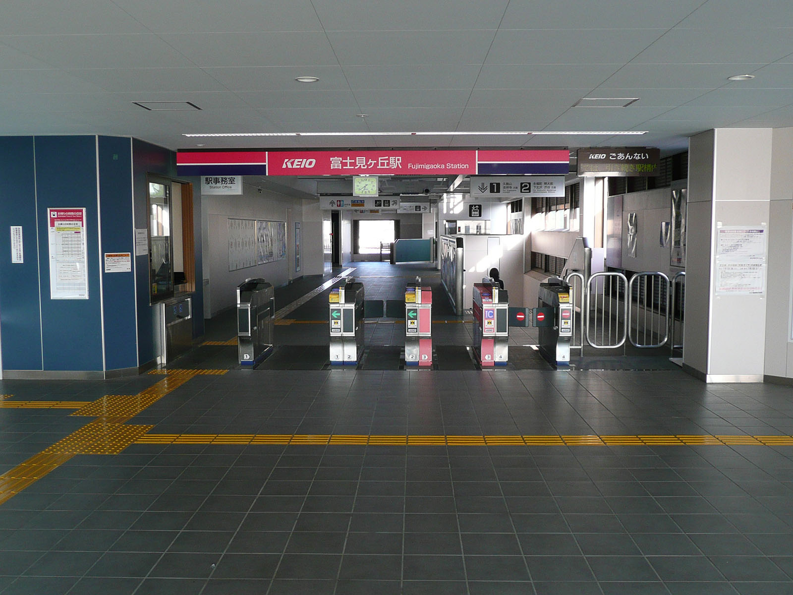 富士見ヶ丘駅改札口